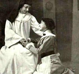 Escena de la representación de la obra de teatro Canción de cuna (1911), de Gregorio Martínez Sierra